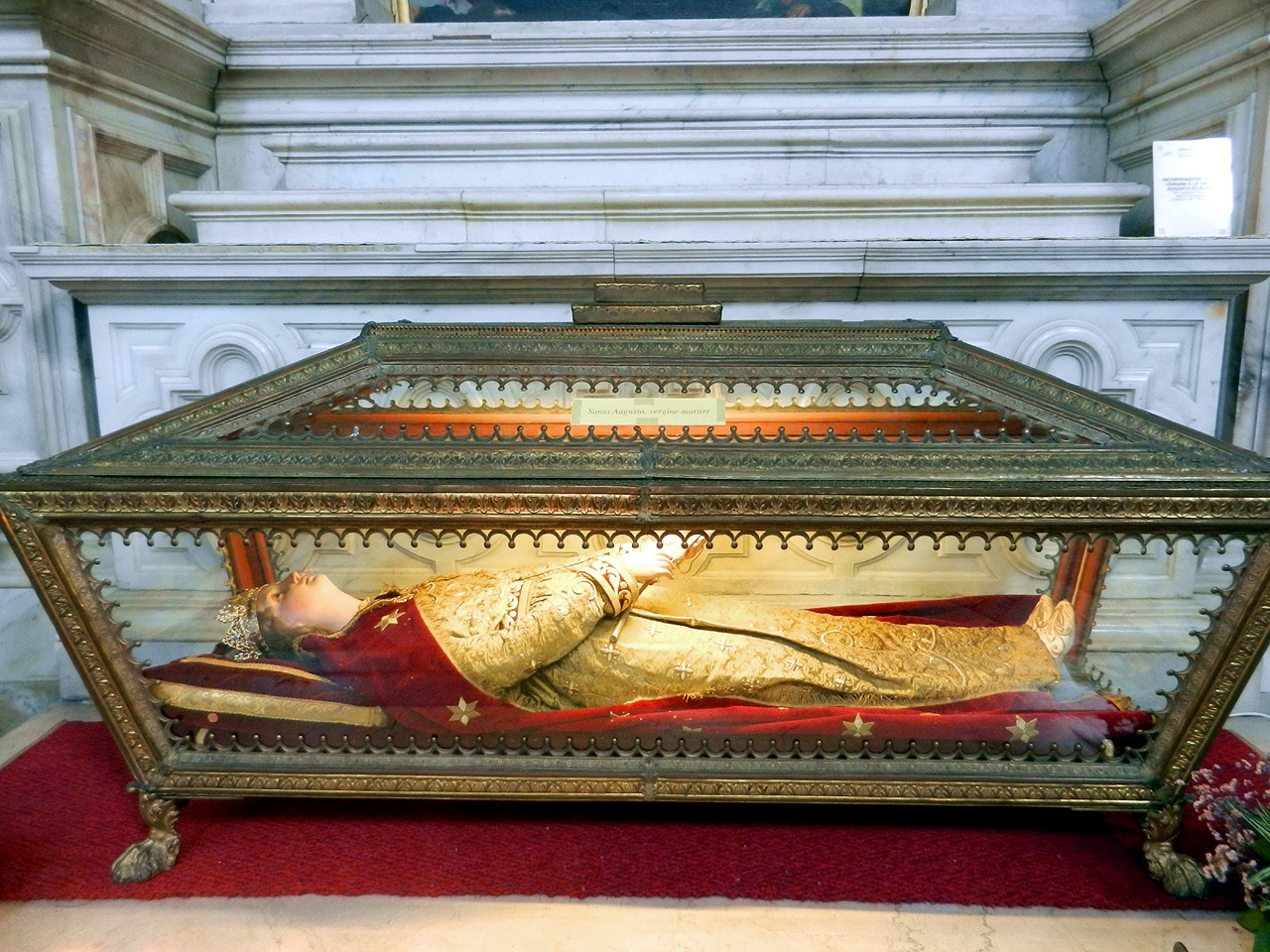 Vittorio Veneto - Urna con le spoglie di S. Augusta all'interno del Duomo di Serravalle (Chiesa di S. Maria Nova)